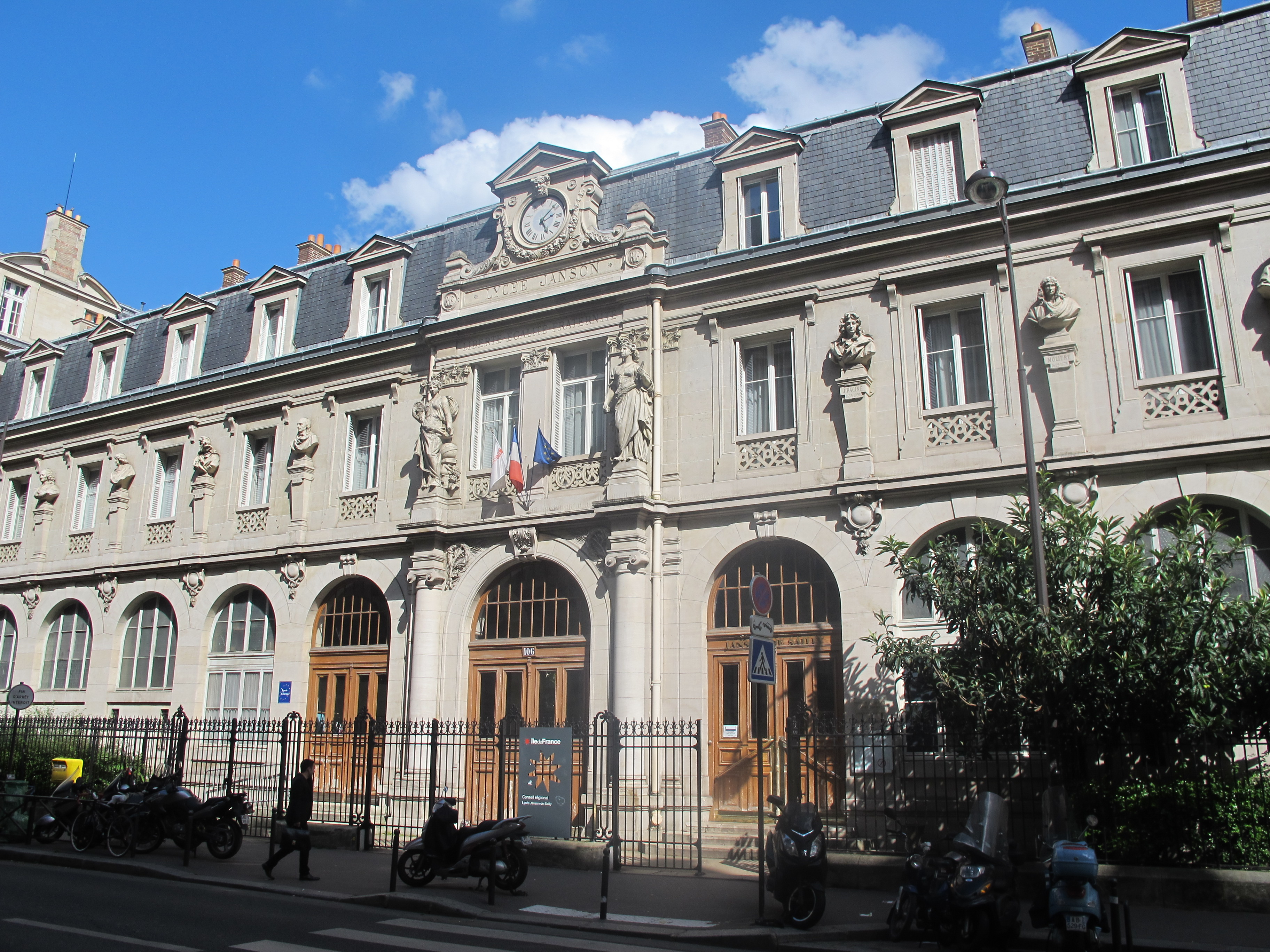 Façade du lycée Janson-de-Sailly (Paris).